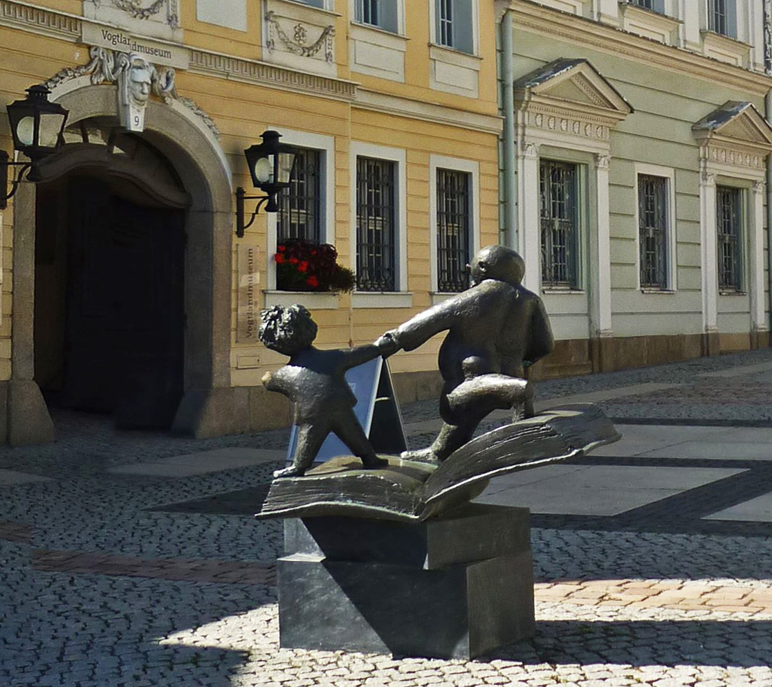 Das Vater-und-Sohn-Denkmal in Plauen (Rückseite)